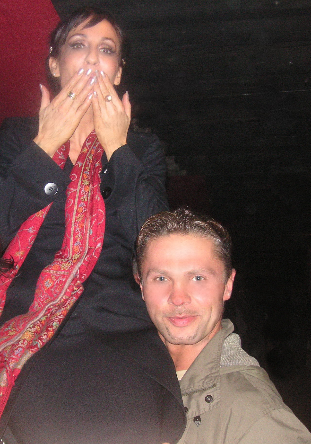 Carsten Rietschel und Musicalsängerin Anna Maria Kaufmann bei den Elblandfestspielen in Wittenberge.